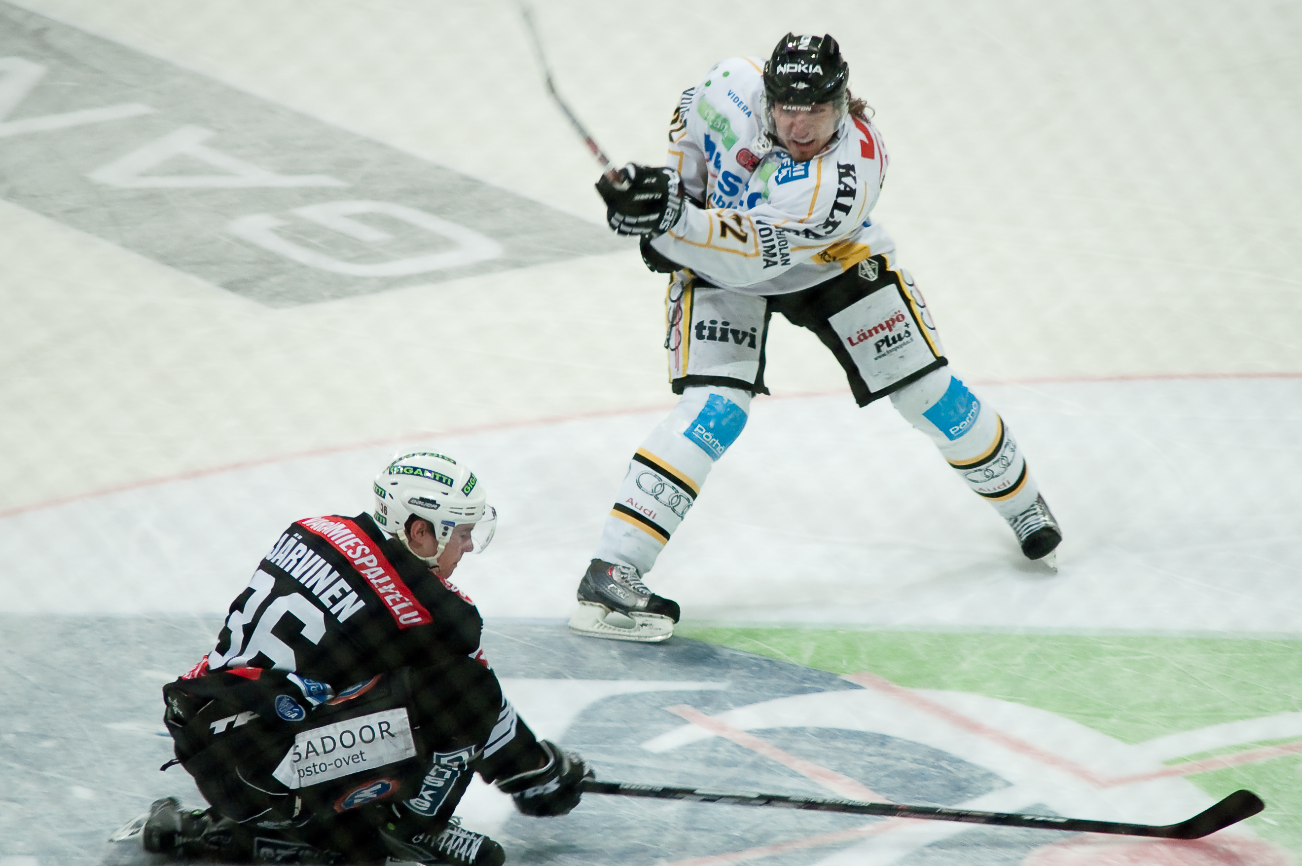 Czech Lukáš Kašpar (Kärpät, white jersey) and Finnish Joonas Järvinen (TPS, black jersey)